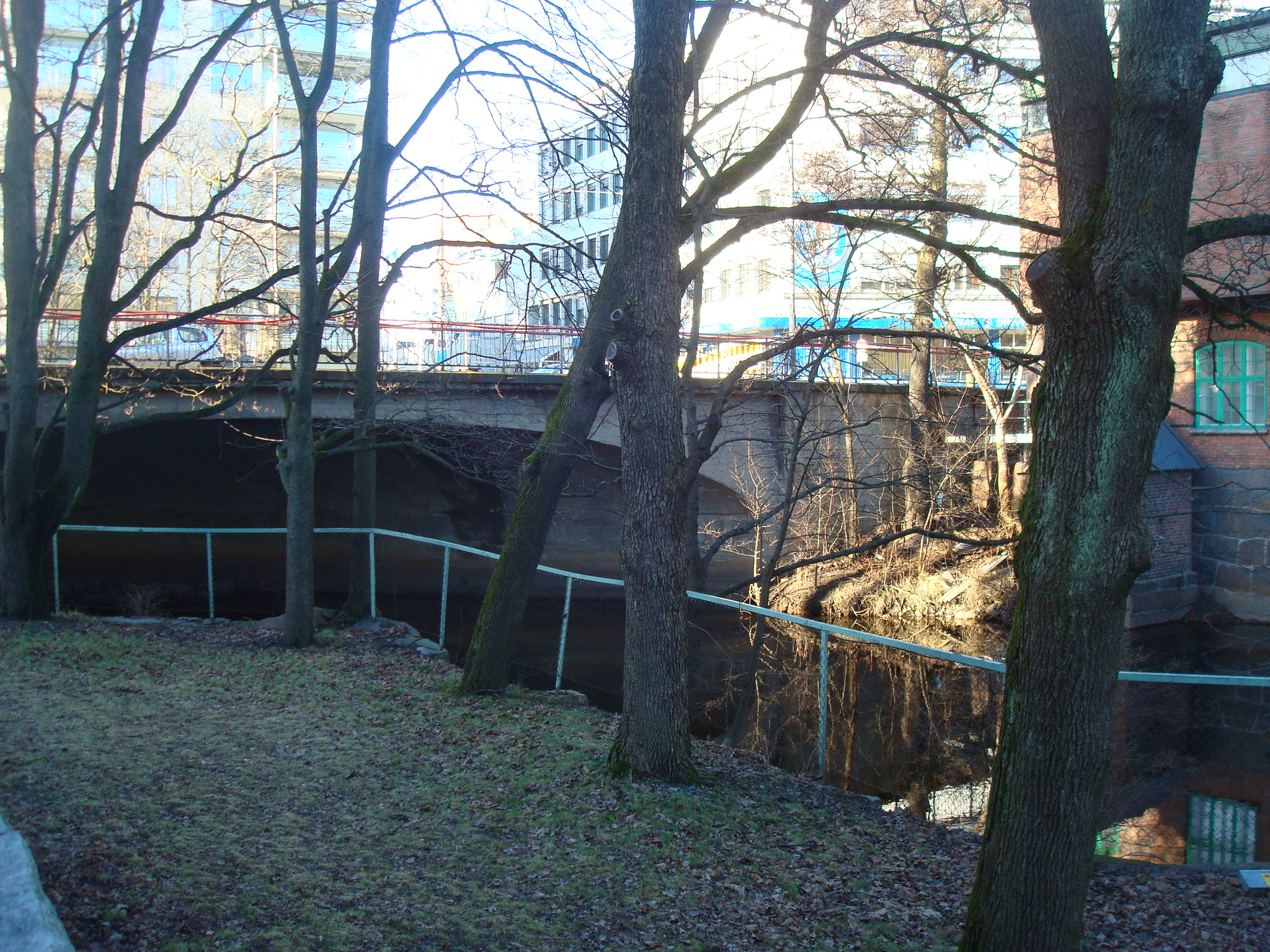 Treschows bru i Oslo, sett oppover elven.